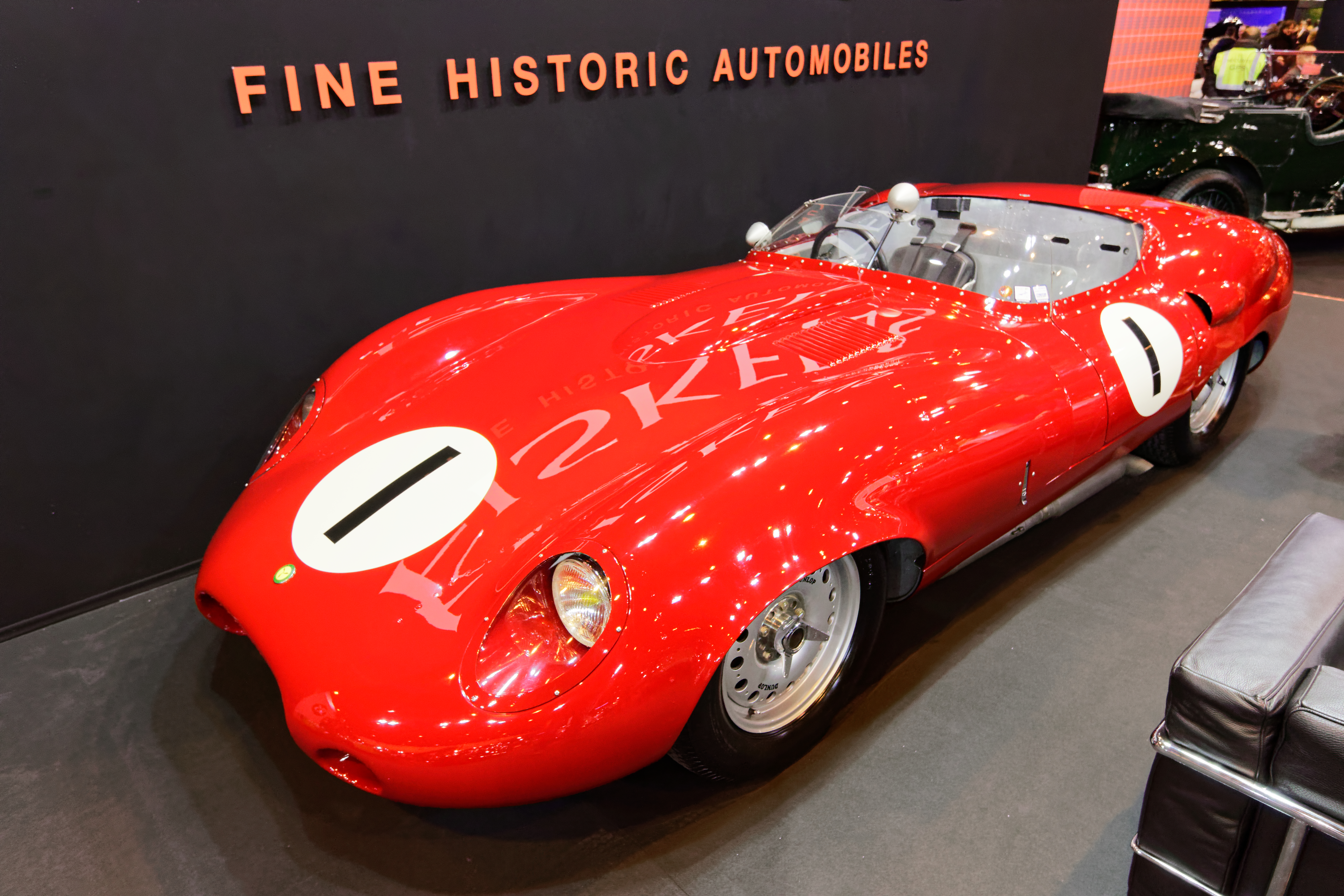 Une Lister Costin Chevrolet de 1959 exposée lors du salon Rétromobile 2017.